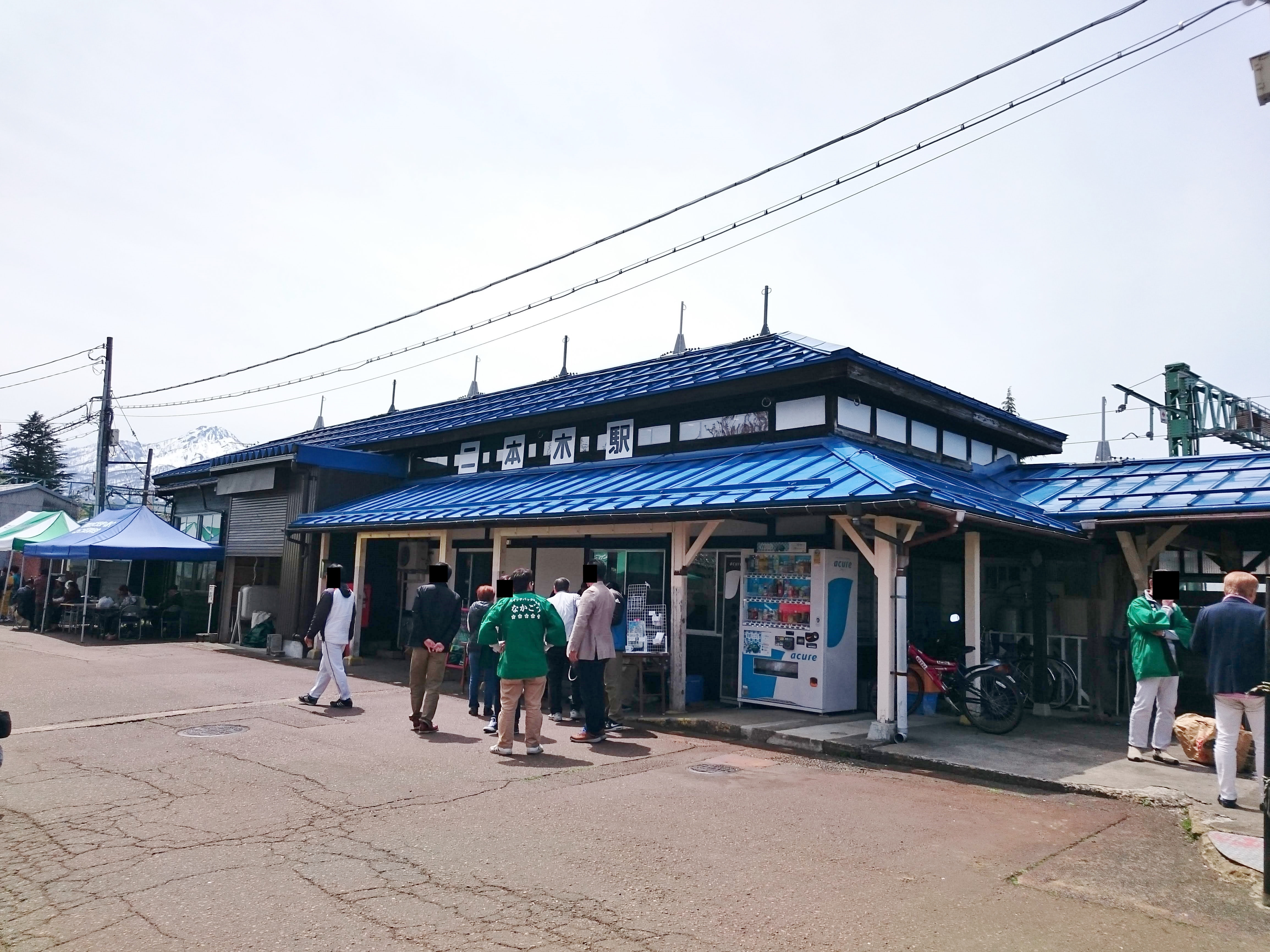 復元改修後の二本木駅の駅舎外観